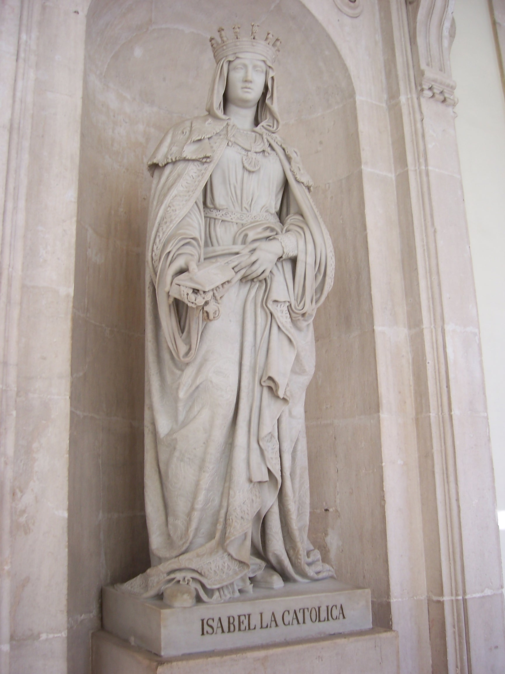 Statue Isabella I. (Spain)